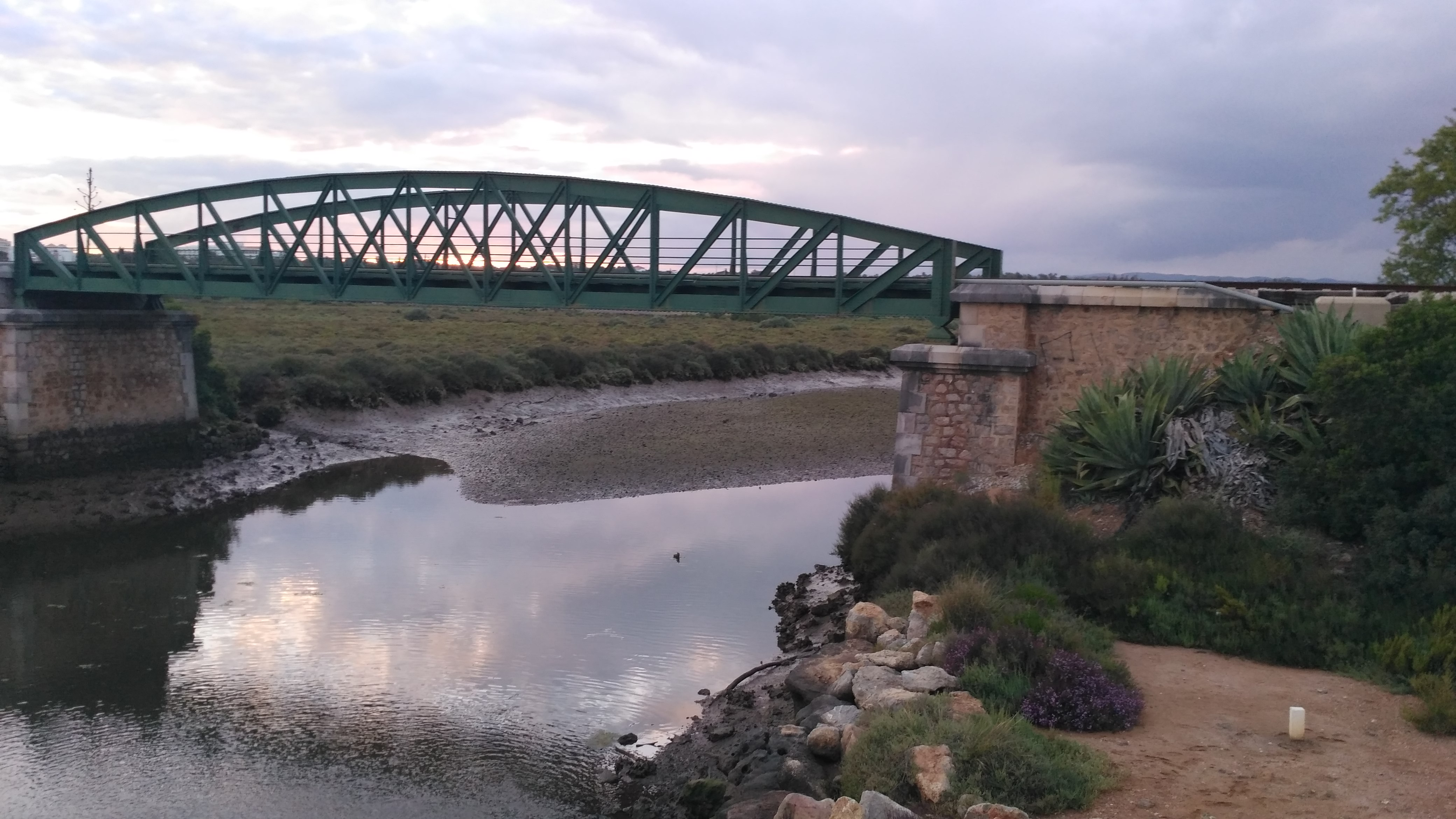 Ponte ferroviária sobre a Ribeira do Almargem. Ponte construída na 1ª década do século XX, reforçada recentemente.